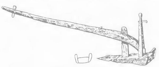 Լոռվա արոր (19-րդ դար)